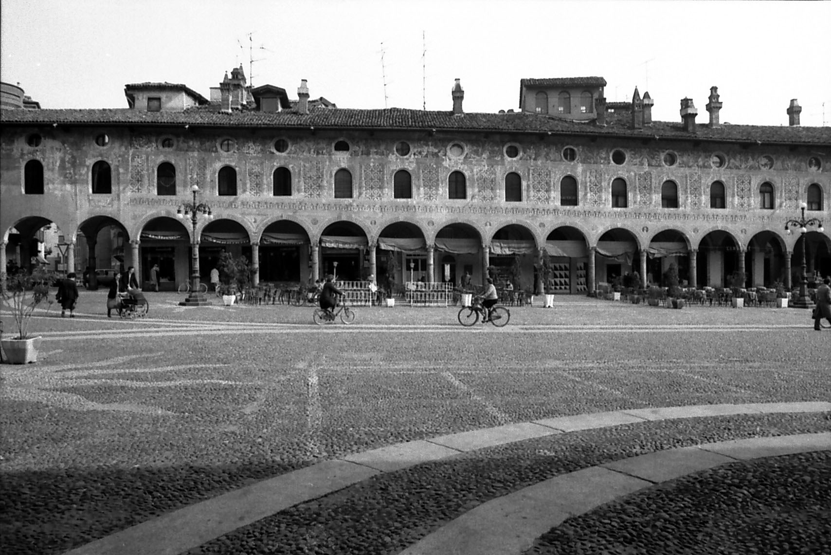 Vigevano, Piazza Ducale, 1.04.1980